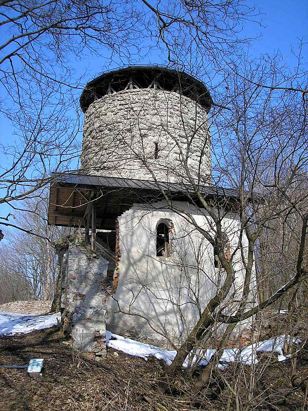 Burg Haltenberg, Kapellenruine und Bergfried